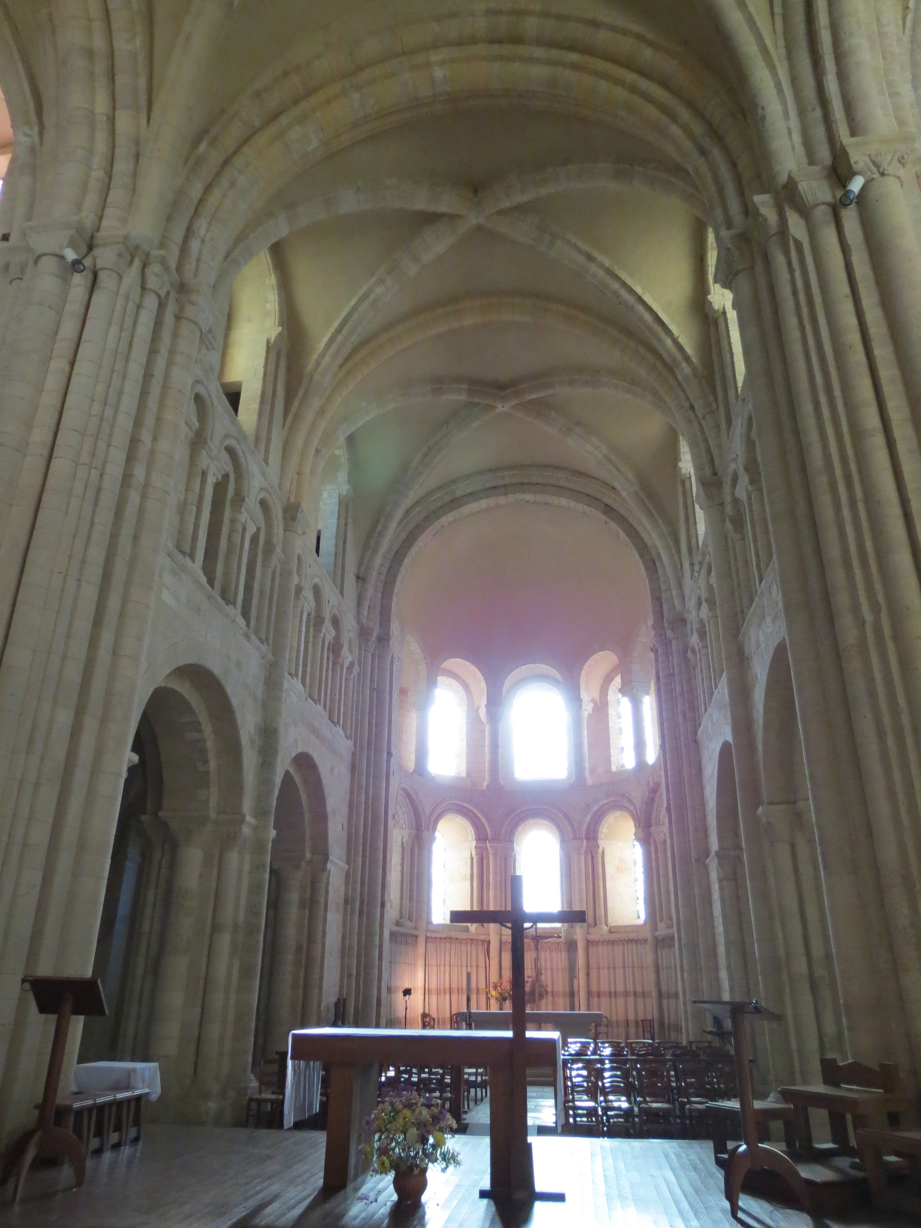 Abbaye de Lessay - choeur